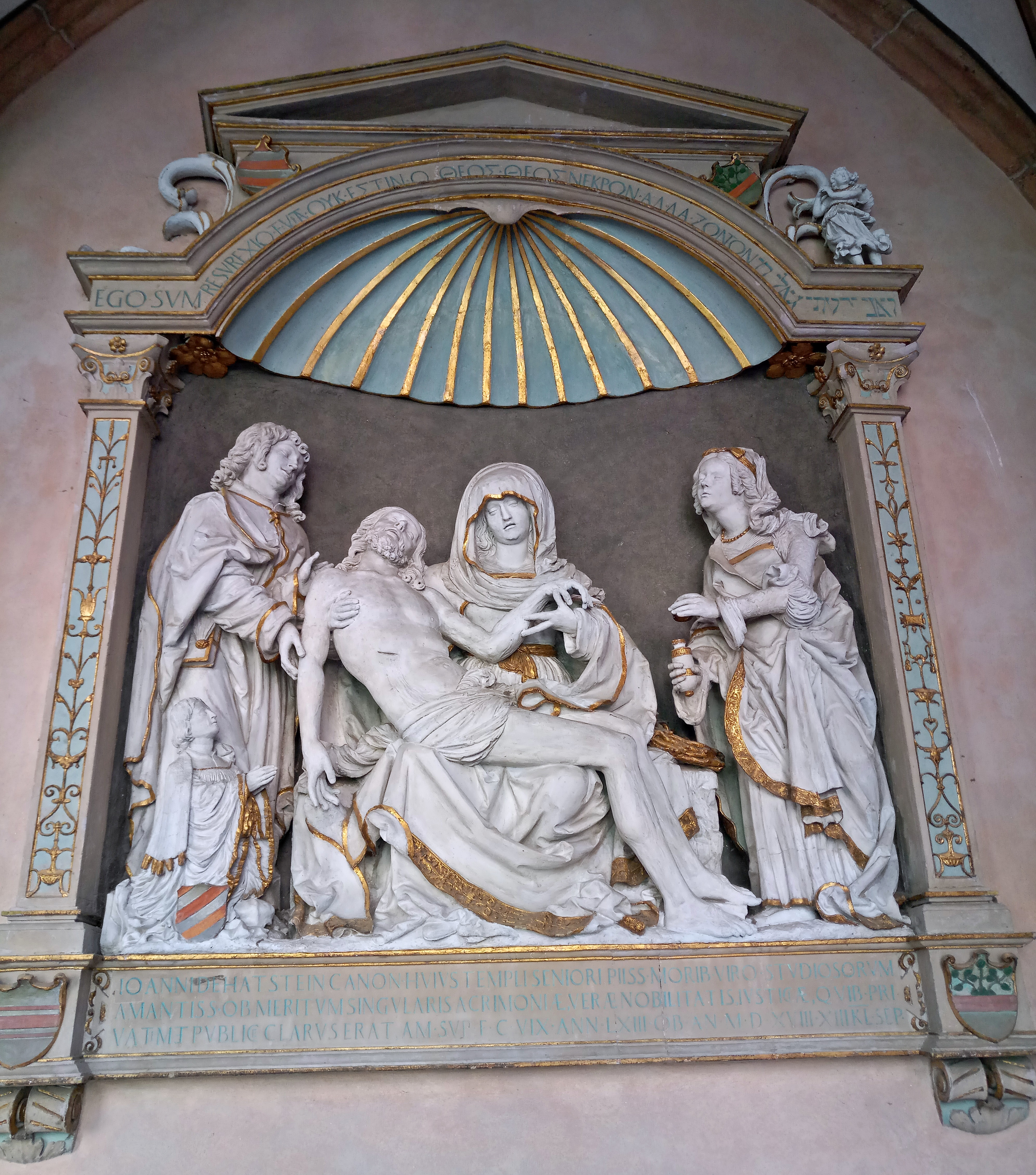 Mainzer Dom, Kreuzgang, Grabmal des Domherrn Johann von Hattstein (+ 1518)